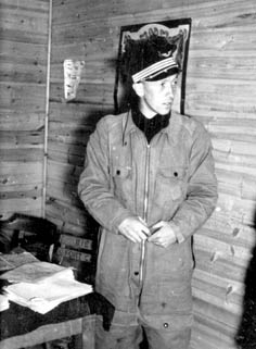 Accart dans le PC de l'escadrille à Saint-Dizier en 1940.